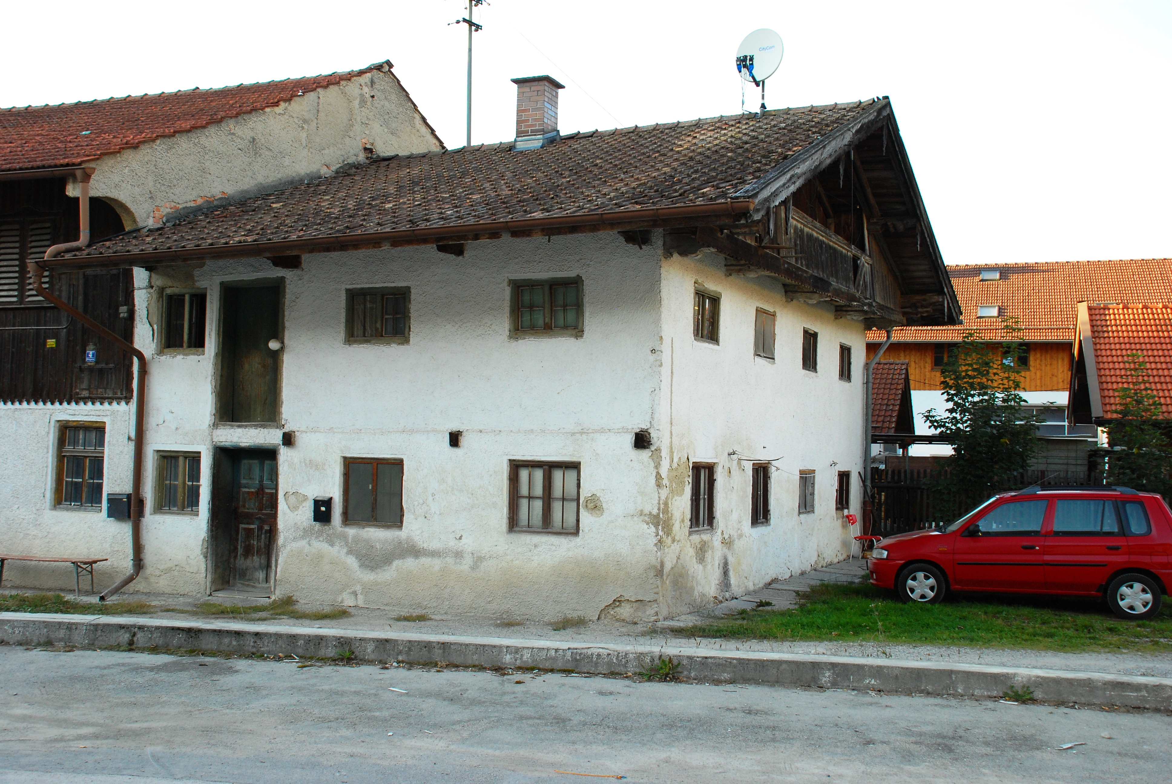 Bauernhaus in der Bräugasse 4 in Aying, Landkreis München, Regierungsbezirk Oberbayern, Bayern. Als Baudenkmal in der Bayerischen Denkmalliste aufgeführt. Foto gemäß den Voraussetzungen zur Panoramafreiheit von öffentlicher Verkehrsfläche aus aufgenommen.